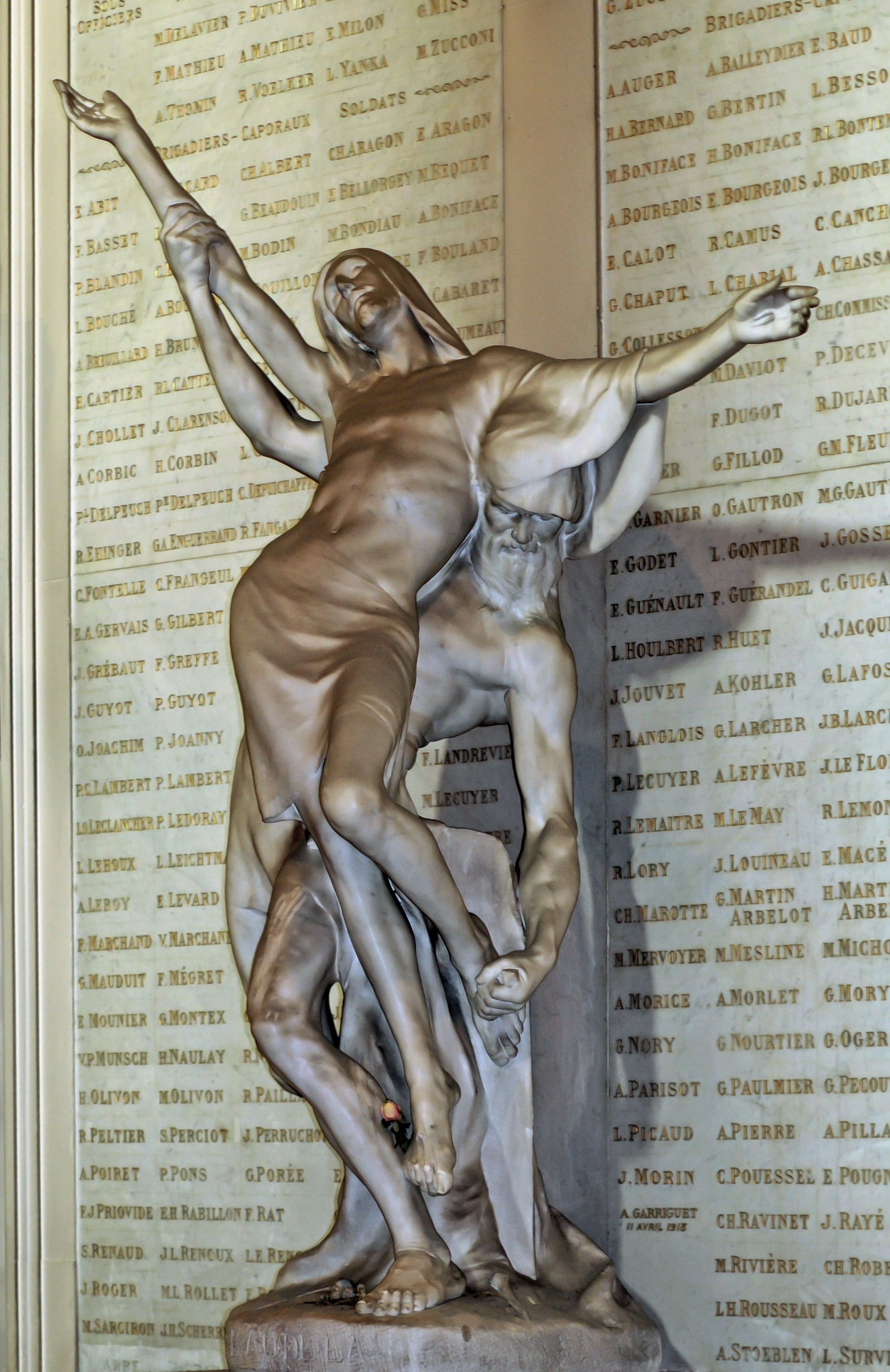 La Descente de Croix, par Honoré Icard (Église Saint-Germain de Saint-Germain-en-Laye)